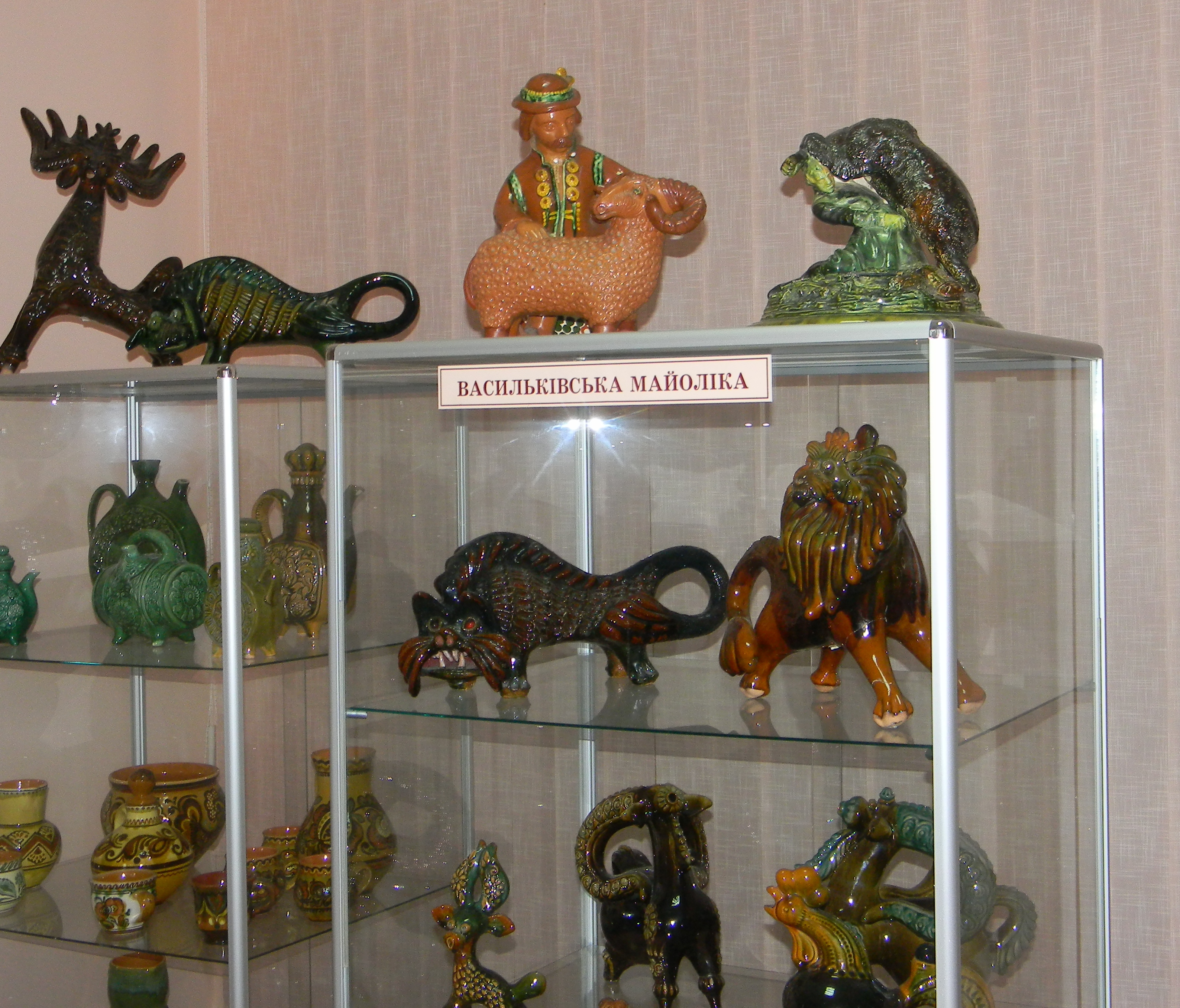 Васильківська майоліка в колекції краєзнавчого музею